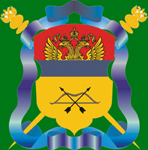 Герб Оренбургского войскового казачьего общества